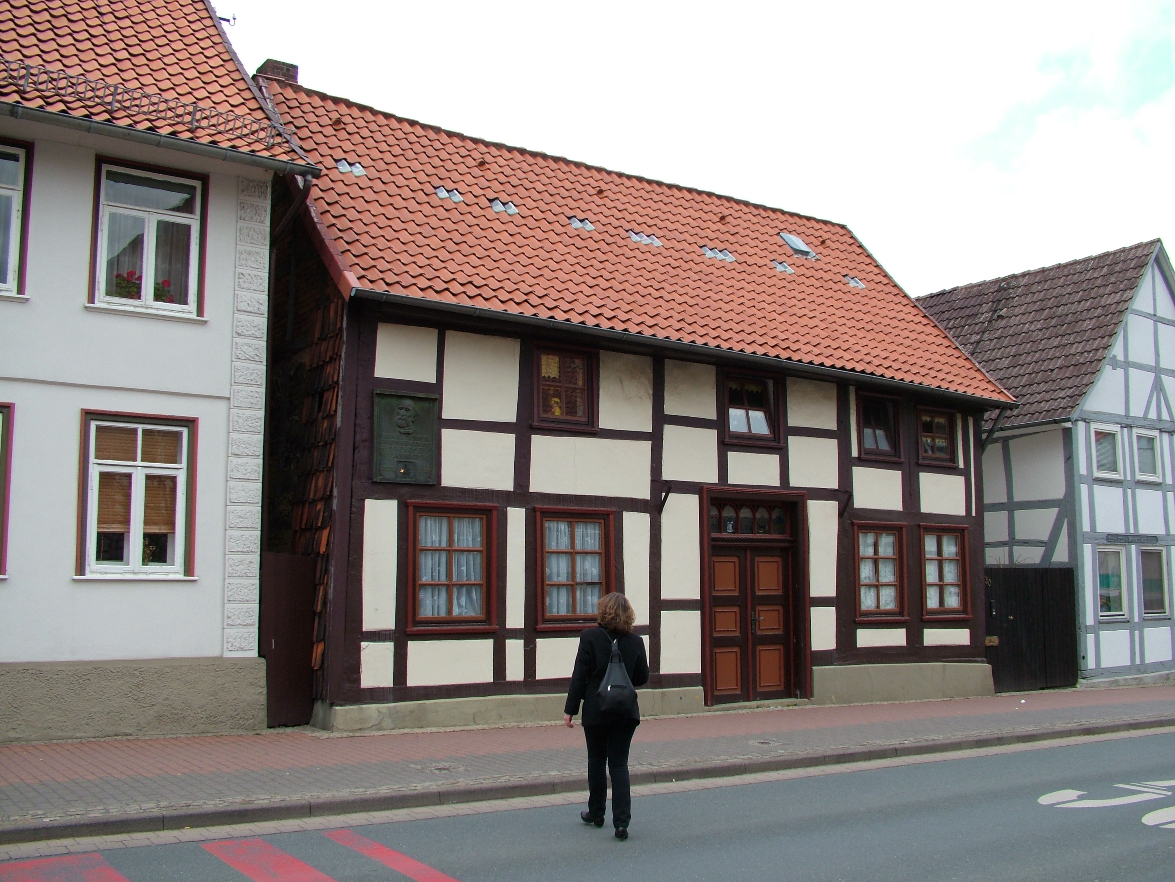 Wohnhaus Heinrich Göbels in Springe/Niedersachsen.